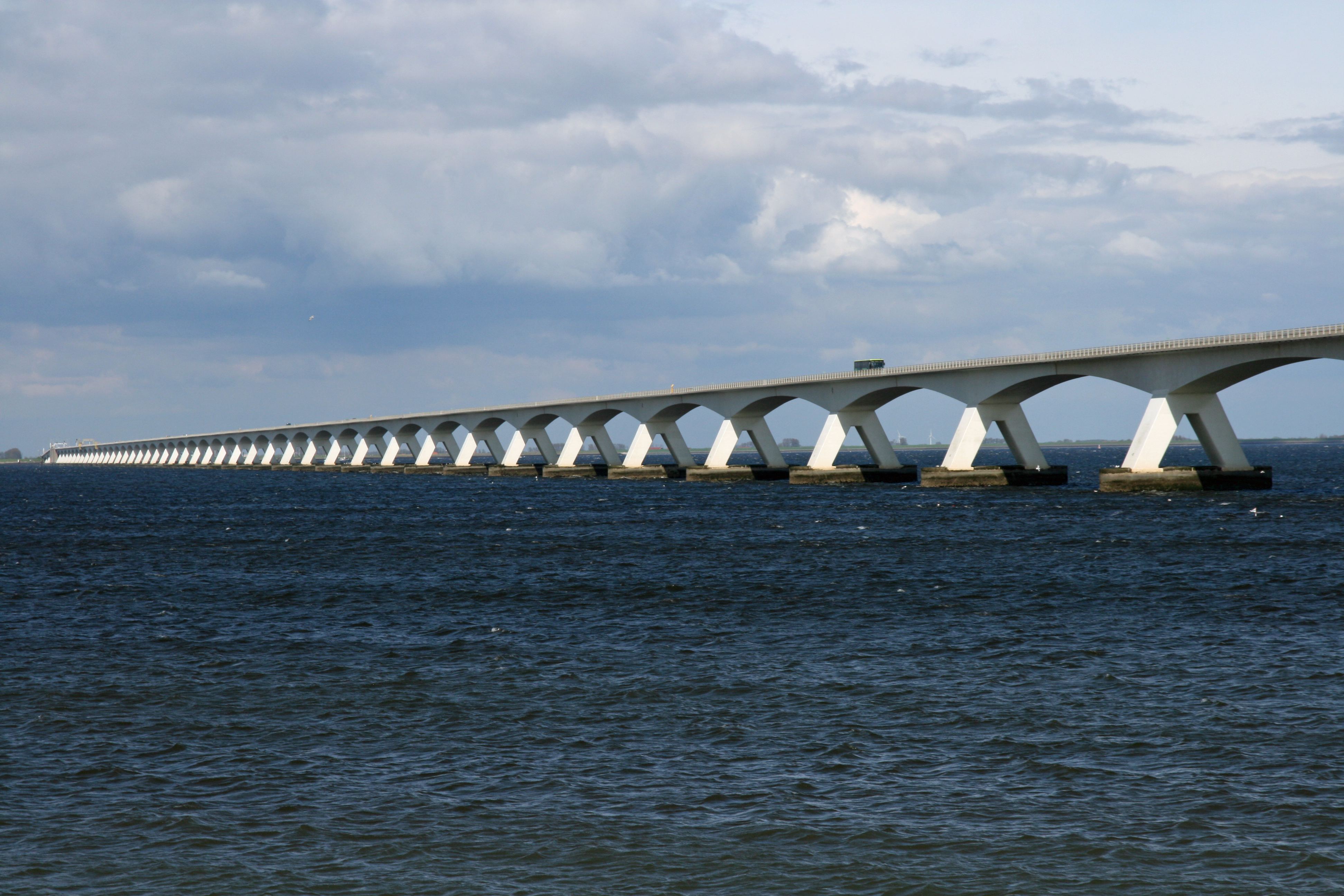 Zeelandbrug tussen Schouwen-Duiveland en Noord-Beveland